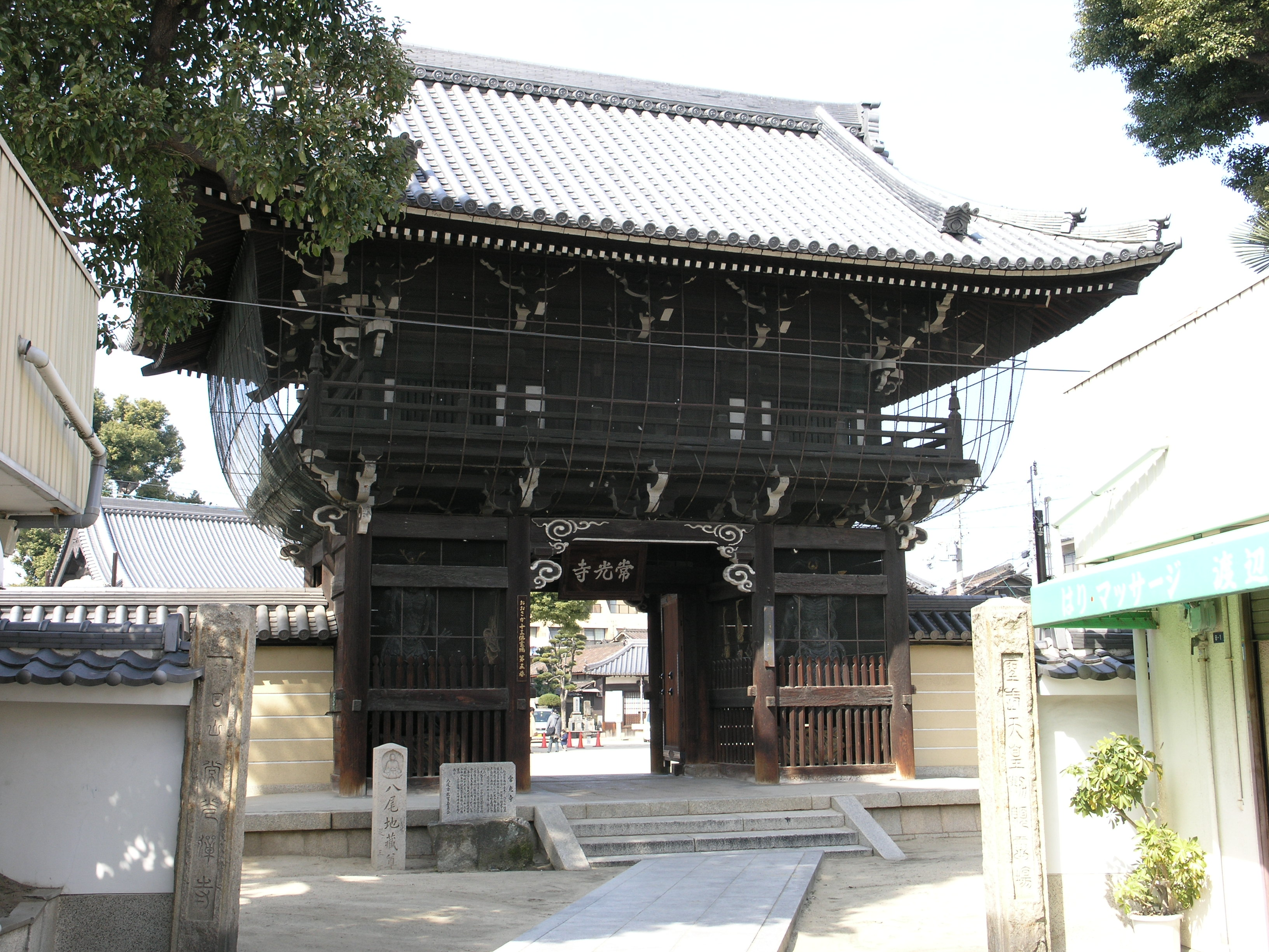 Jōkōji in Yao, Osaka, Japan